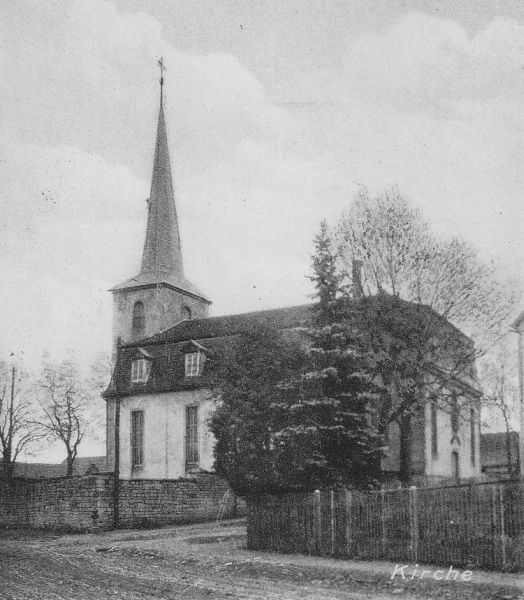 Kirche St. Nikolai in Töttelstedt, Thüringen